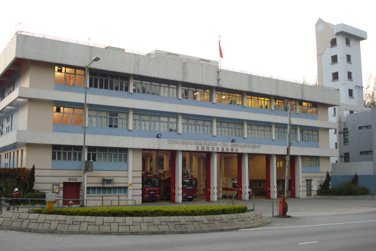 Tung Chung Fire Station